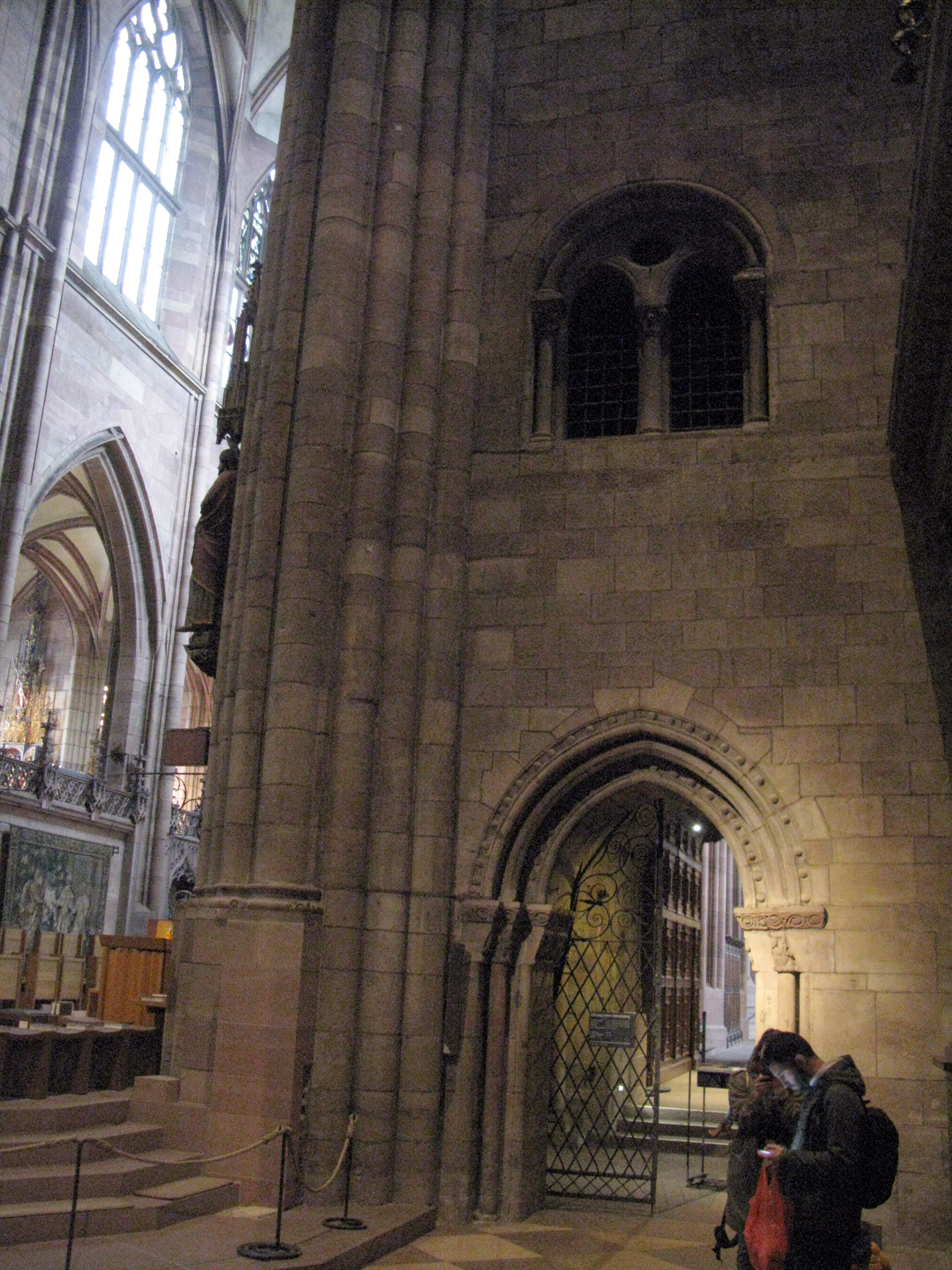 Ostwand des Südquerhauses des Freiburger Münsters mit Eingang zum Chorumgang und den Chorkapellen, darüber ein Fenster zu einem Raum im Hahnenturm, in dem früher das Stadtarchiv untergebracht war und durch das heute das Auxiliarwerk der Orgeln den Klang abstrahlt. Links der Blick in den Chor.